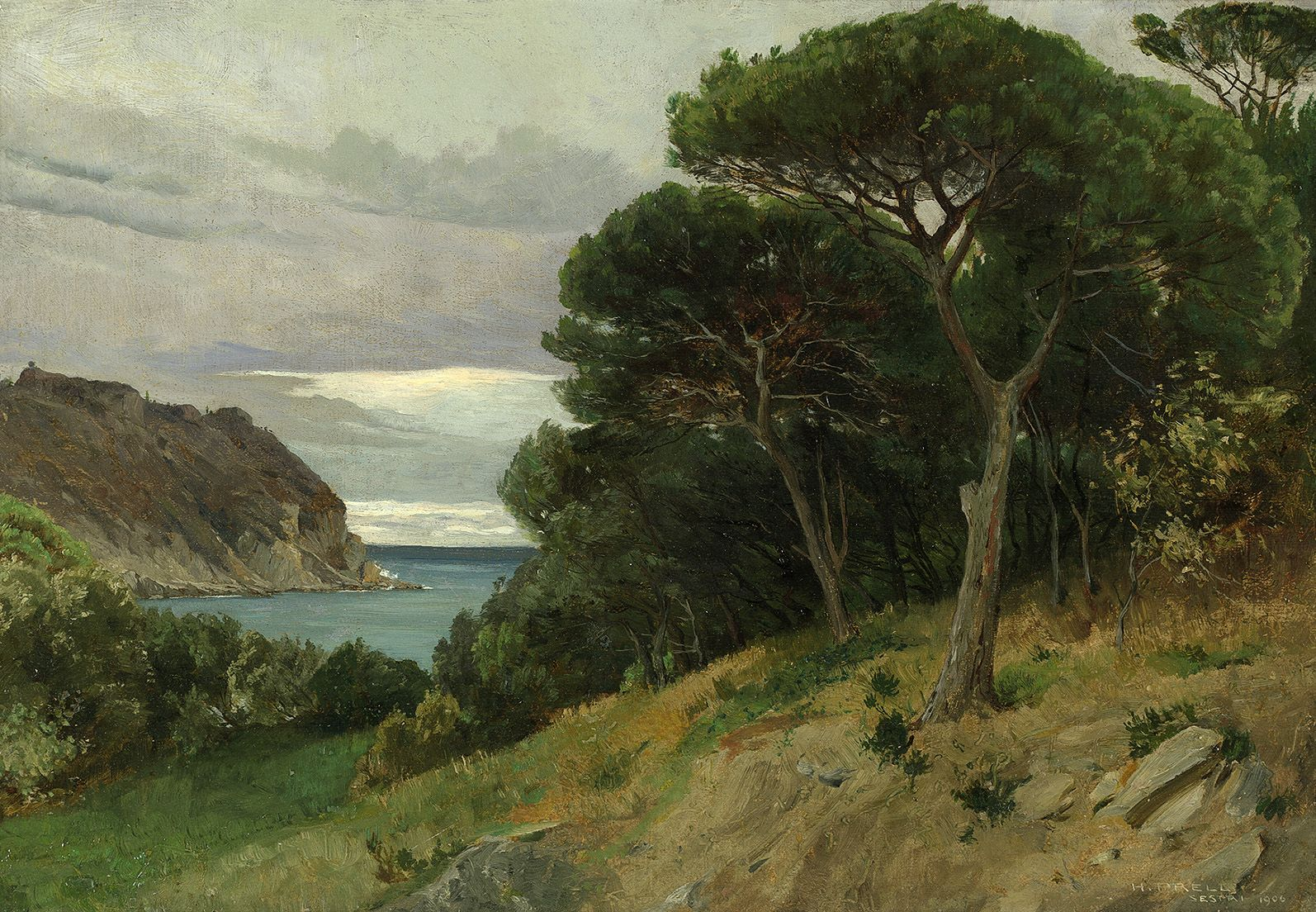 Hermann Prell: Küste bei Sestri Levante. Öl auf Karton, 43 x 62 cm, Rechts unten signiert, bezeichnet und datiert „H. PRELL / SESTRI 1906“